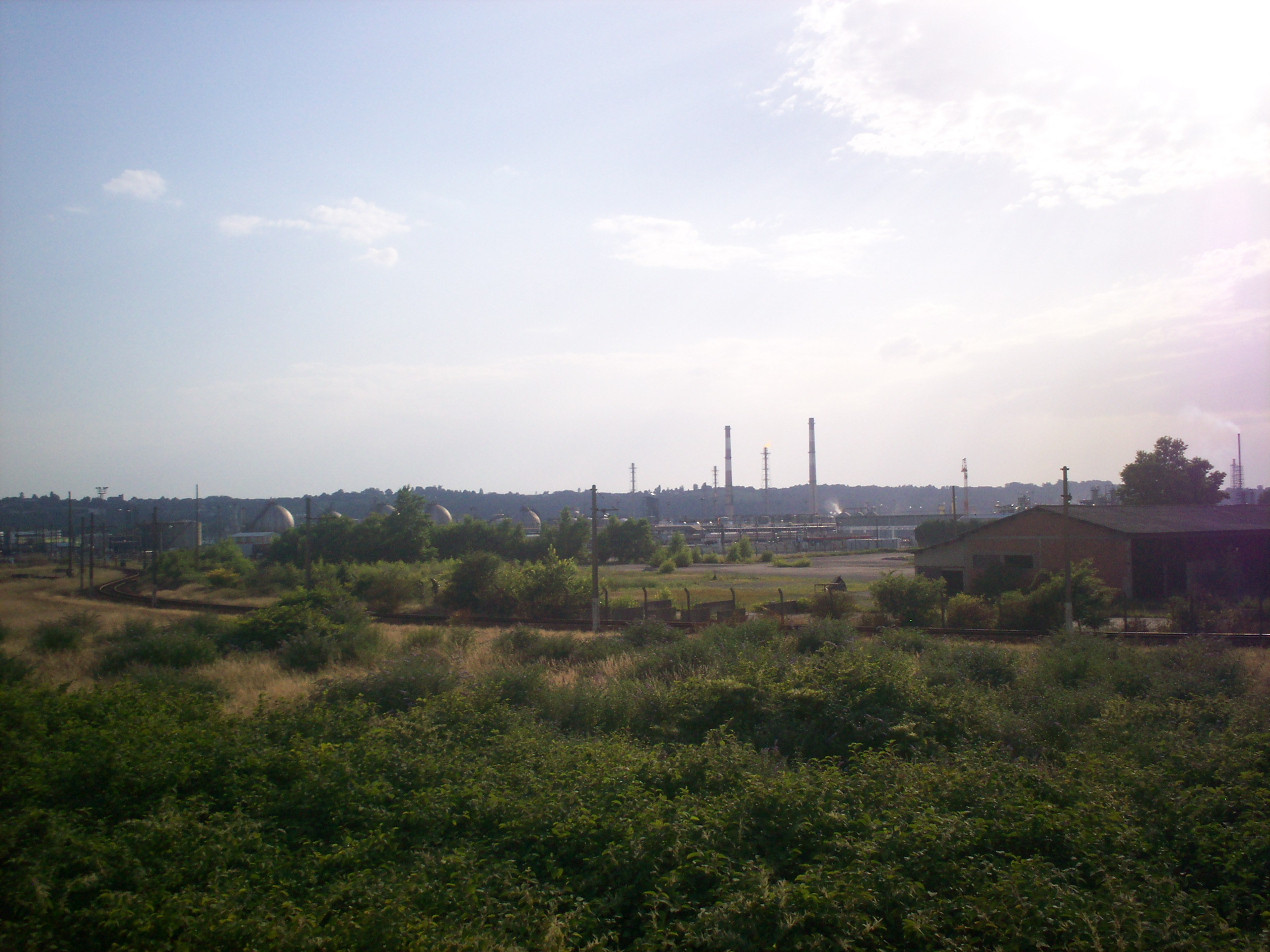 Fotografia personala